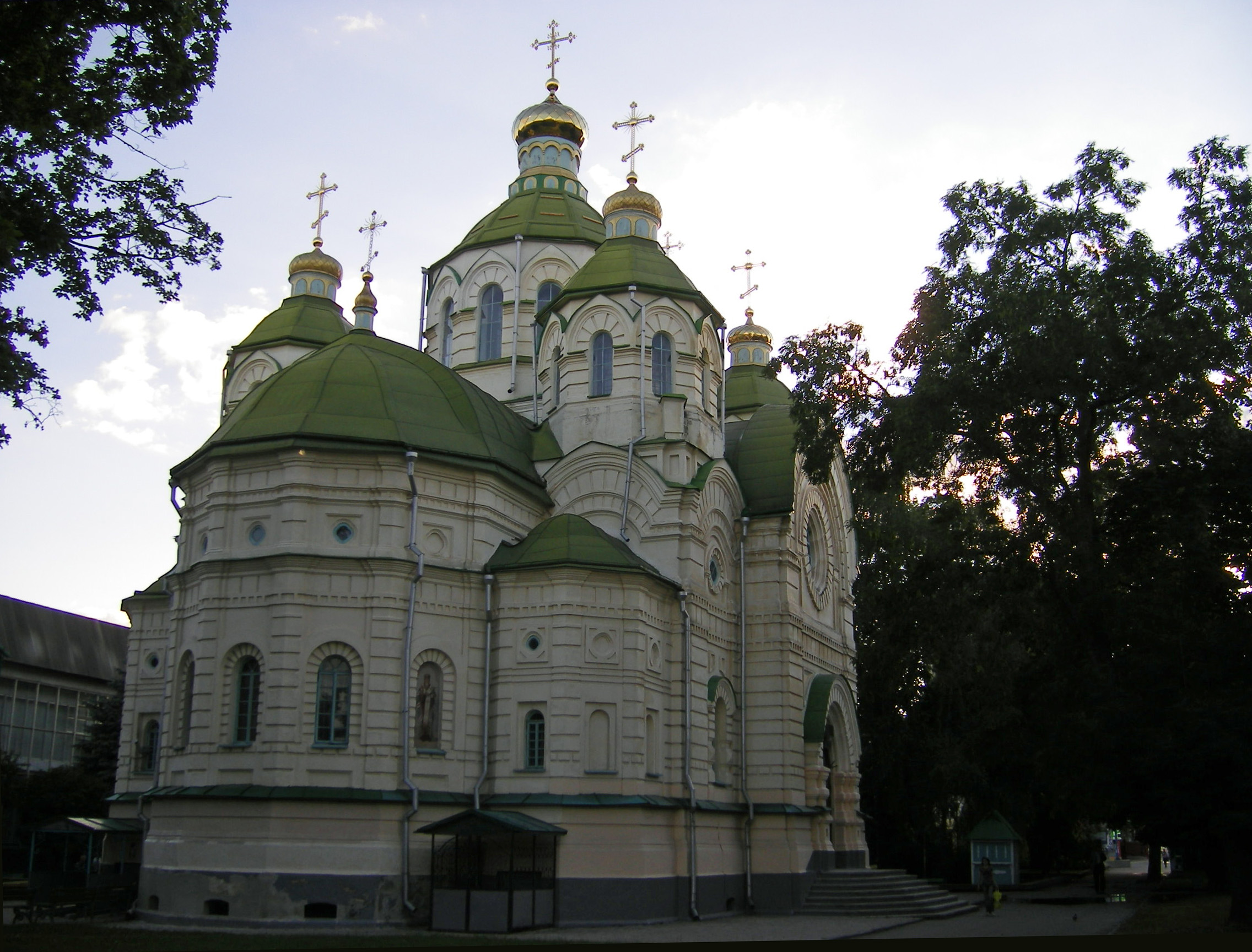 Rivne, Ukraine